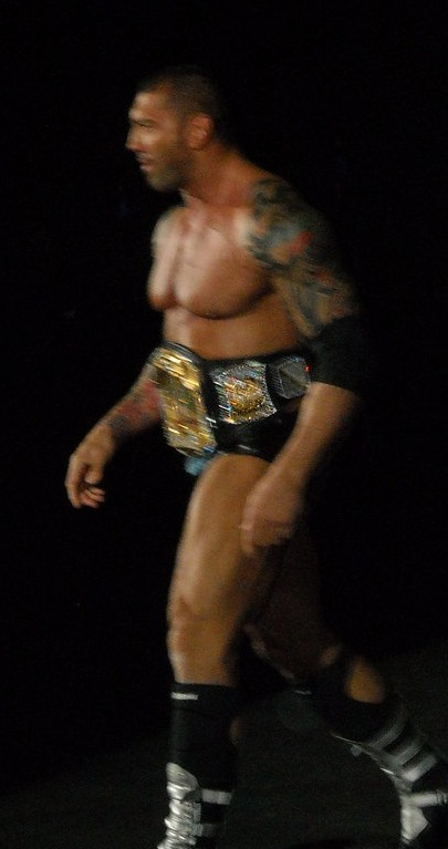 Wwe Tour